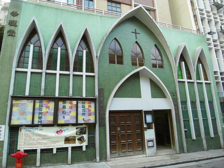 中文（香港）: 必列者士街堂, 公理堂, 上環, 香港